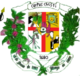 Escudo del municipio Simón Bolívar. Estado Miranda. Venezuela